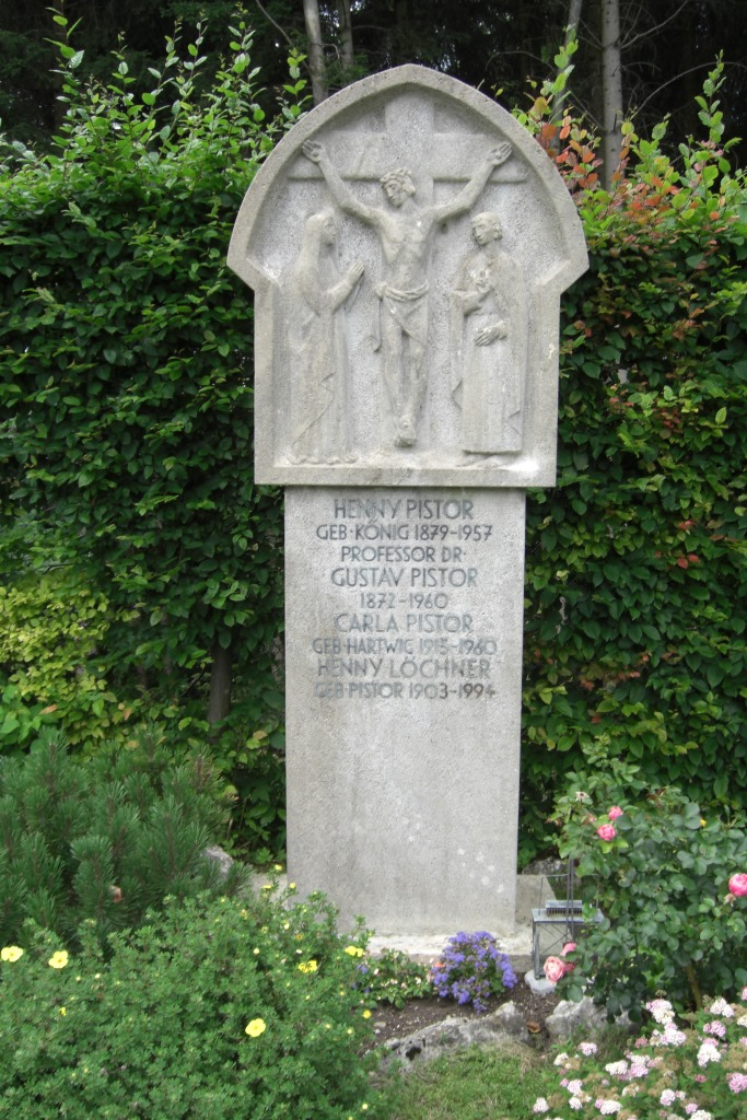 Grab des Chemikers und Managers Gustav Pistor (1872-1960) auf dem Bergfriedhof in Bad Wiessee. Er gilt als „Vater der industriellen Elektrochemie und der deutschen Leichtmetallindustrie“.